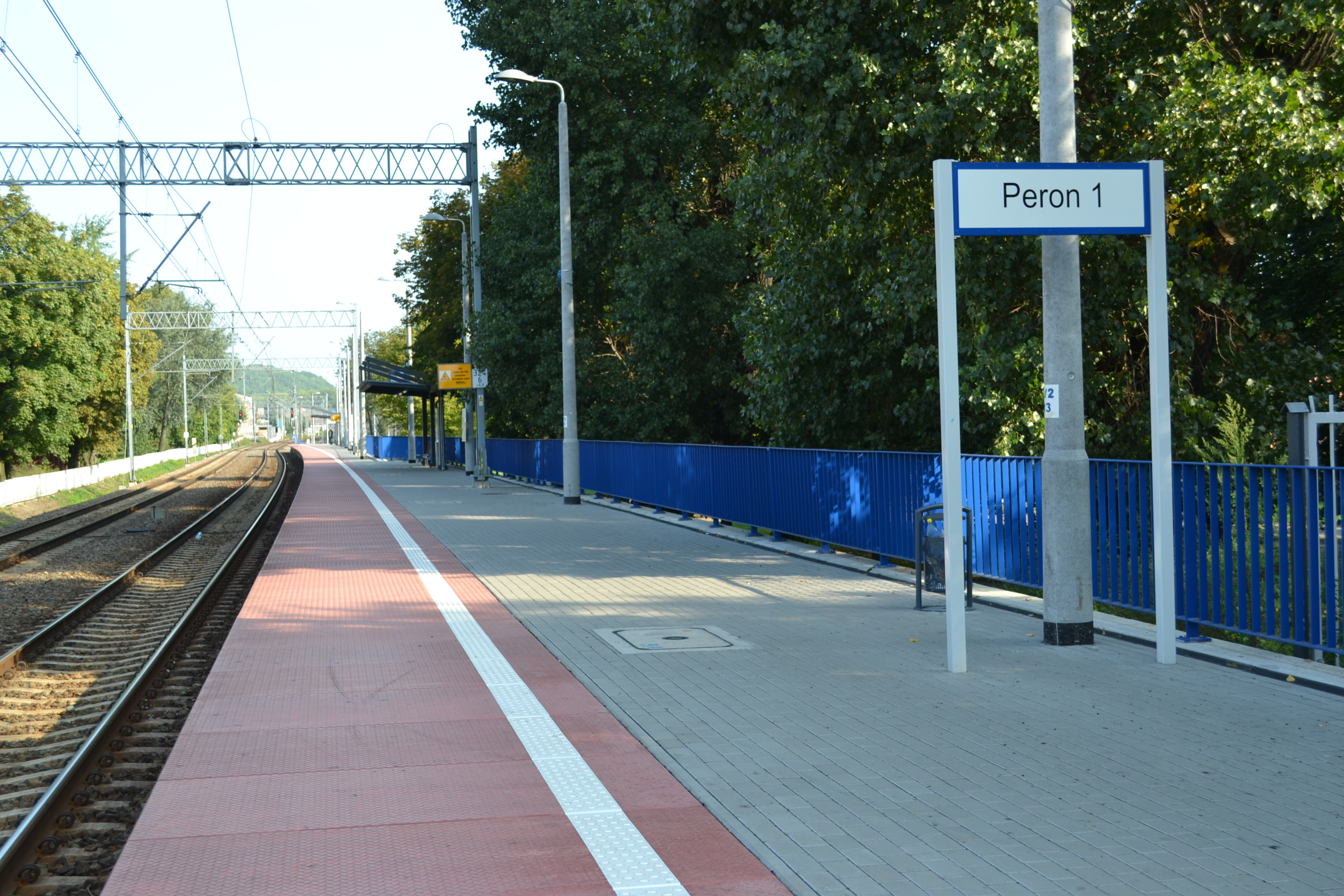 peron 1 Gdansk Orunia